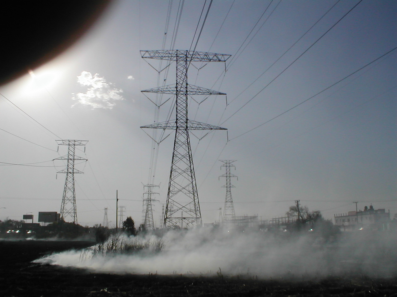 En Av. Las Torres, Metepec, las quemas de pastos emiten contaminantes a la atmósfera. En la foto se está tapando el sol con un dedo.